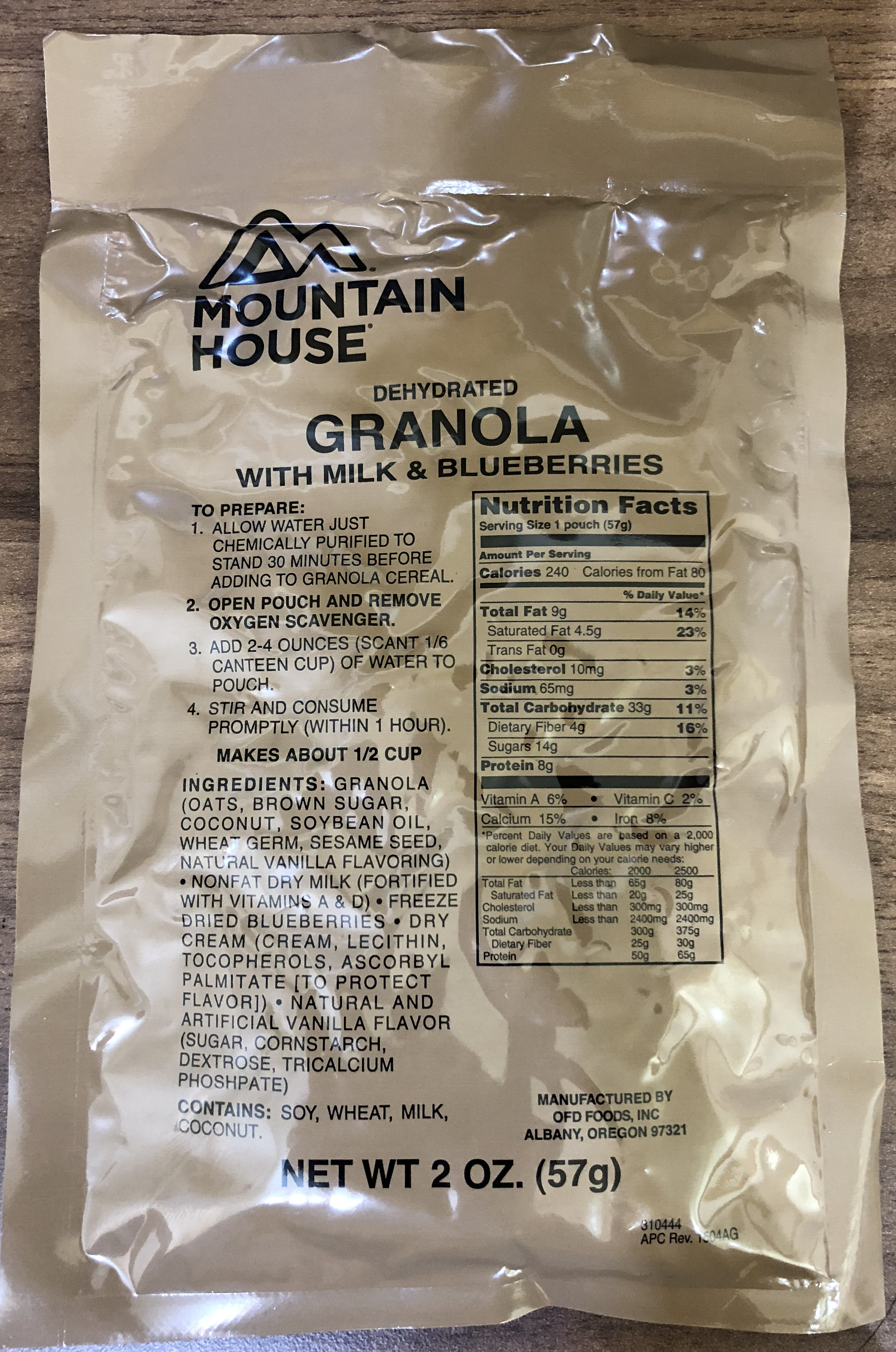 2017の変更点で粉末ミルク入りのグラノーラが追加された。